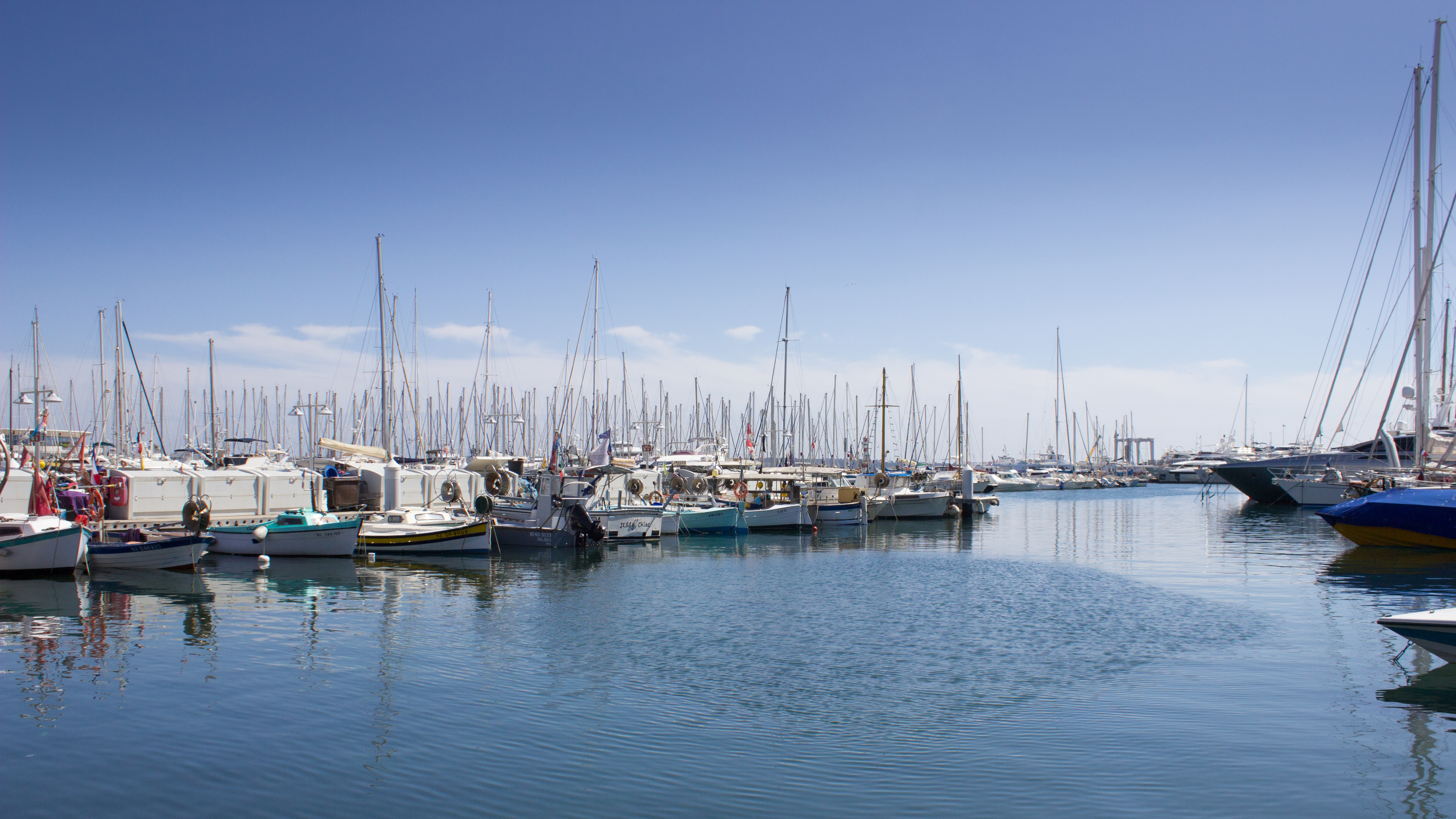 Port de Cannes